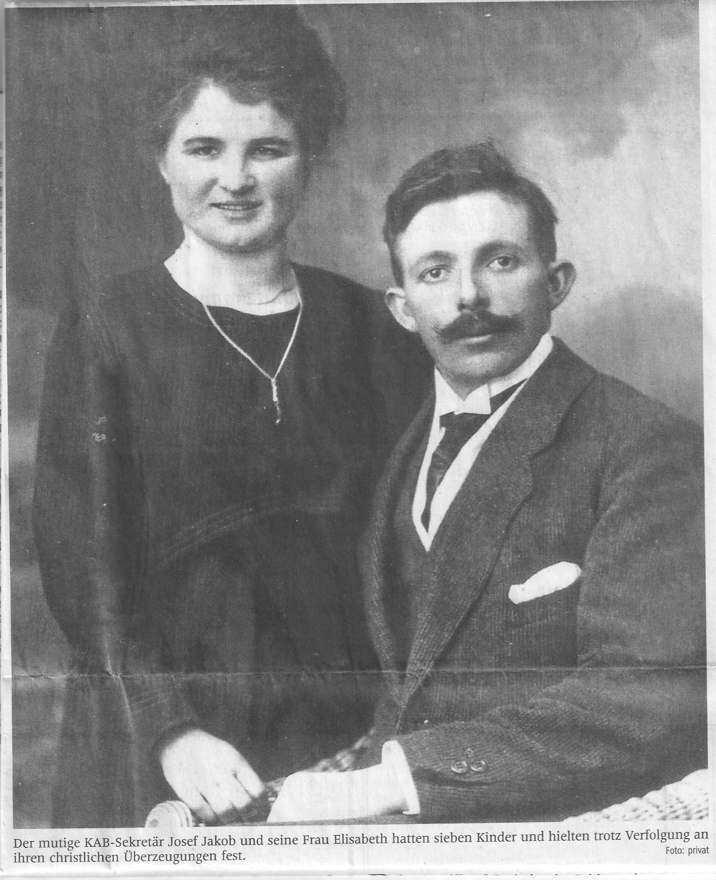 Familienarchiv Wilhelm Jakob, Sohn von Josef Jakob